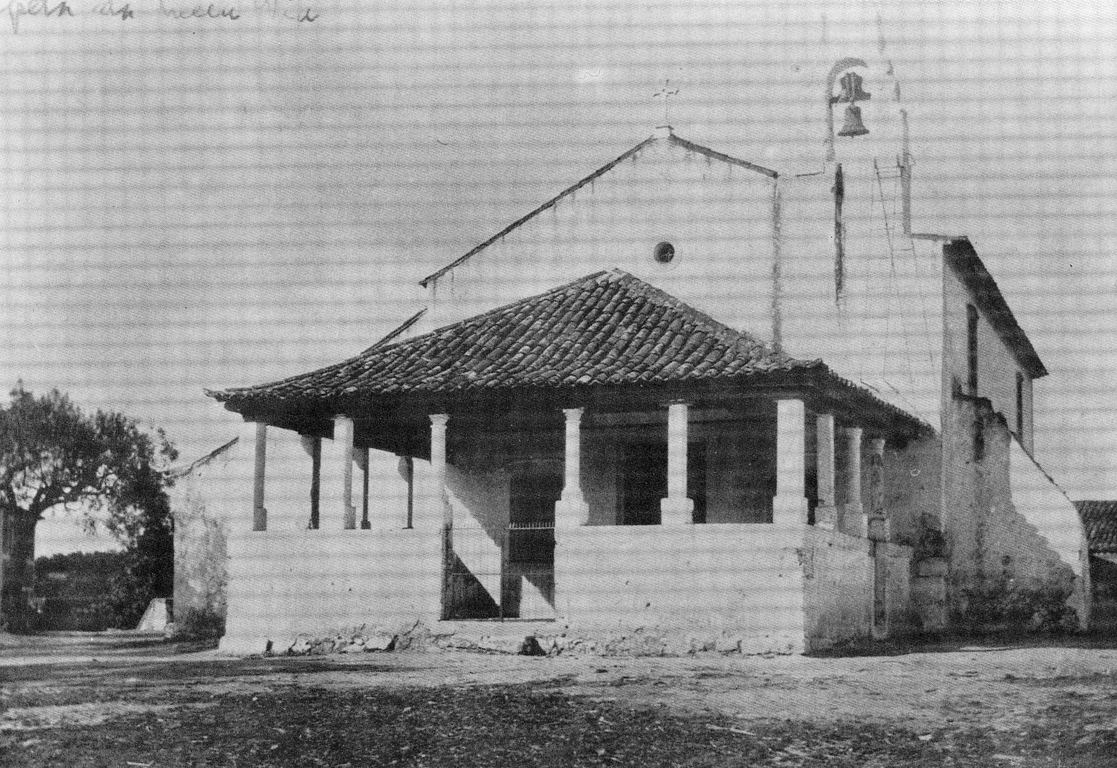 Antiga Capela da Meia via